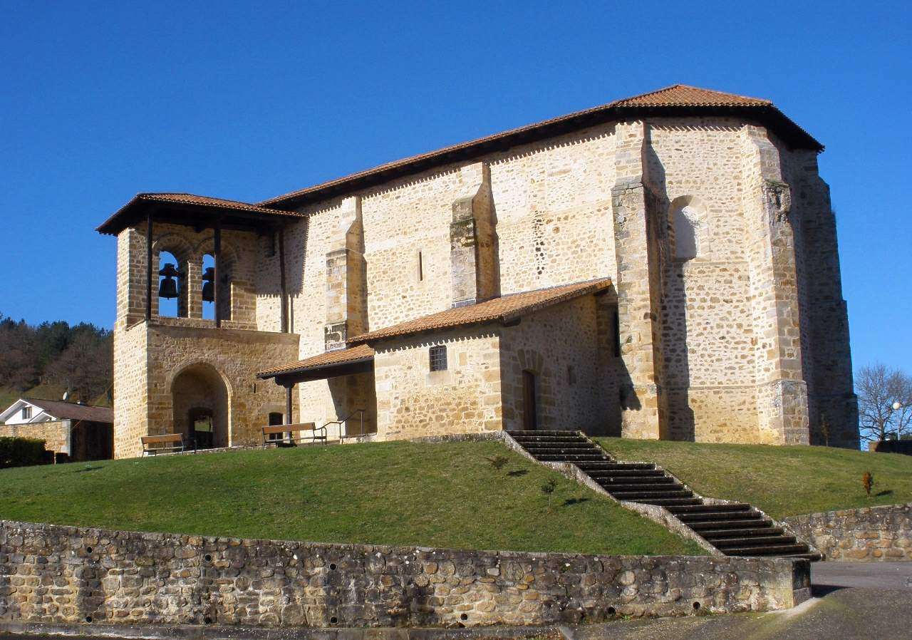 Iglesia de San Andrés, en Ametzaga Zuia (Álava)